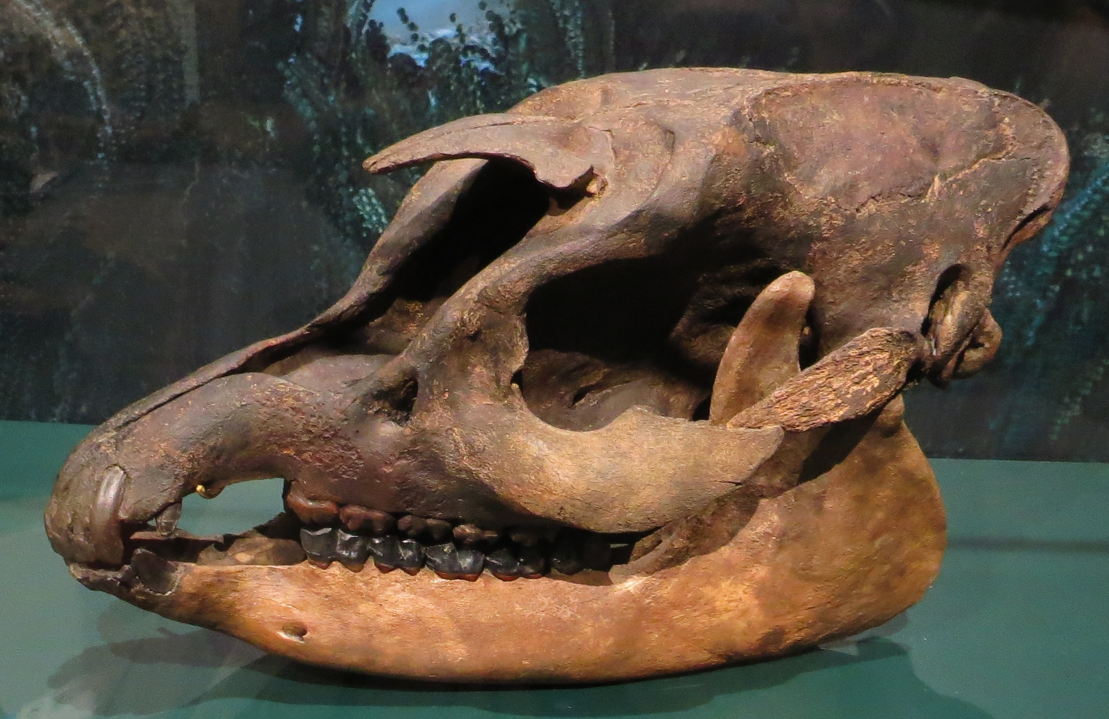 Fossil - Took the picture at Natural History Museum, Karlsruhe